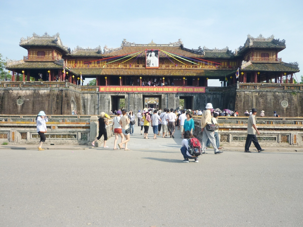 Thể Loại:Di tích cố đô Huế Thể Loại:Du lịch Huế Thể Loại:Du lịch